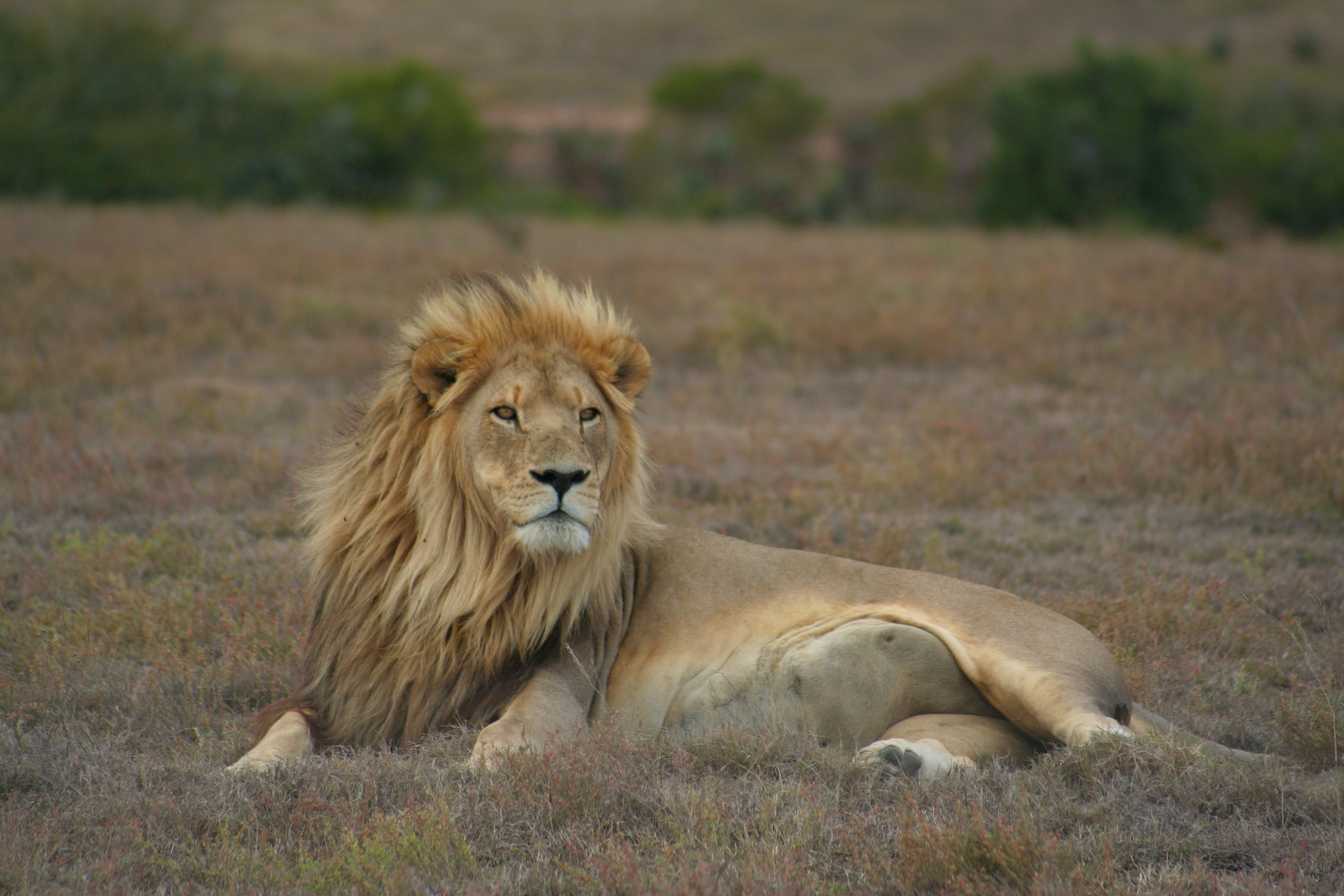 Lion pose